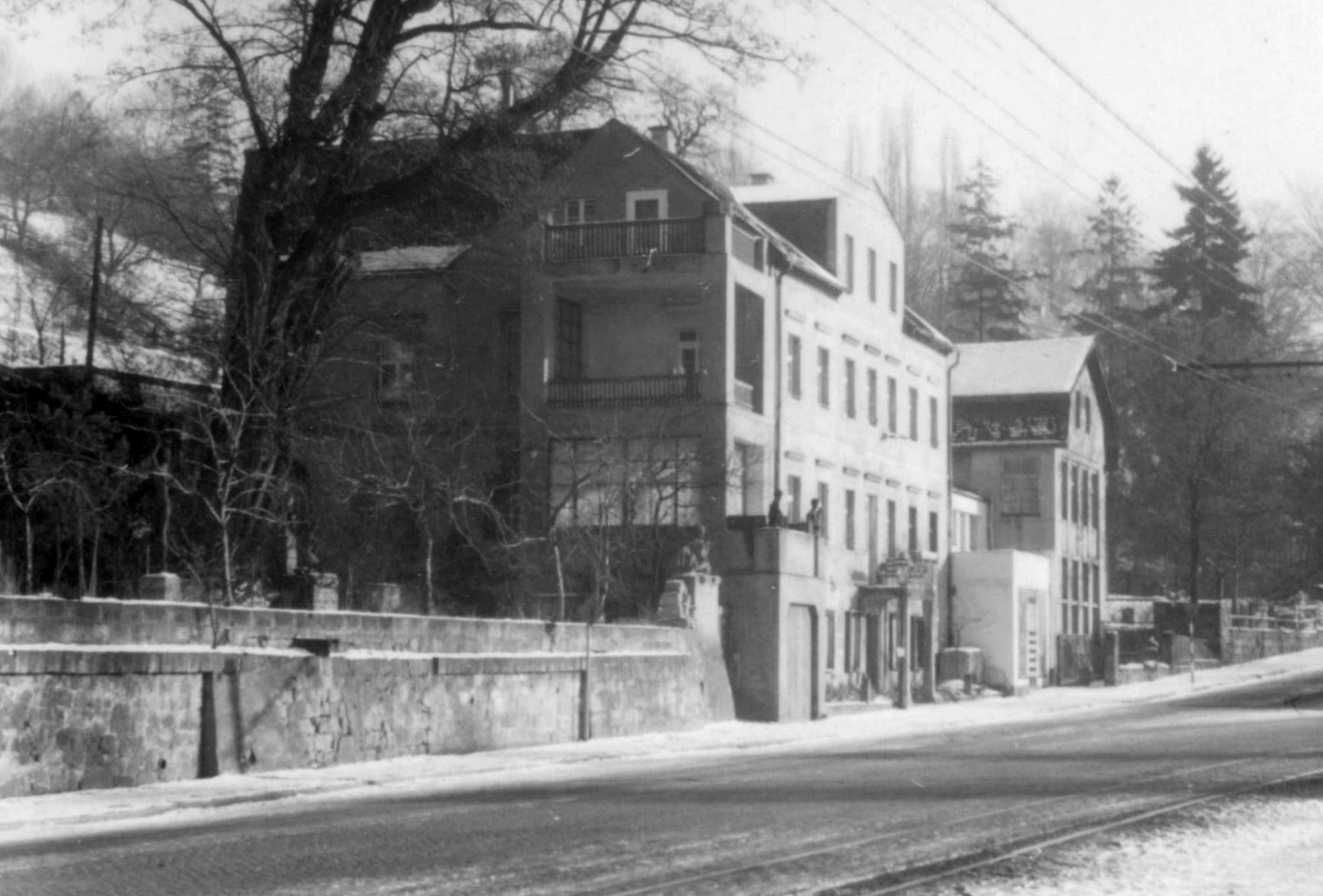 Dresden: Calberlastraße 29 im Jahr 1961. Von 1957 bis 1978 Atelier vom Dresdner Bildhauer Wilhelm Landgraf